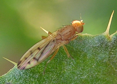 Opomyza florum an einem Gebüschrand in der Nähe von Neuss (Deutschland).